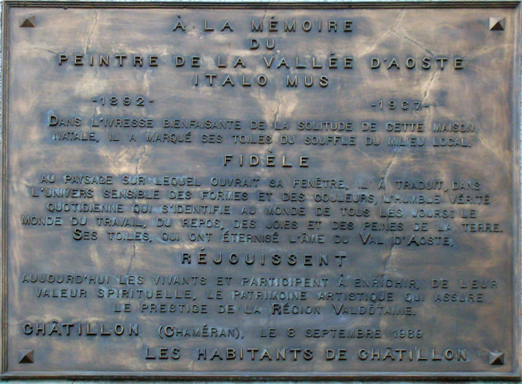 Targa Italo Mus a Châtillon (AO)